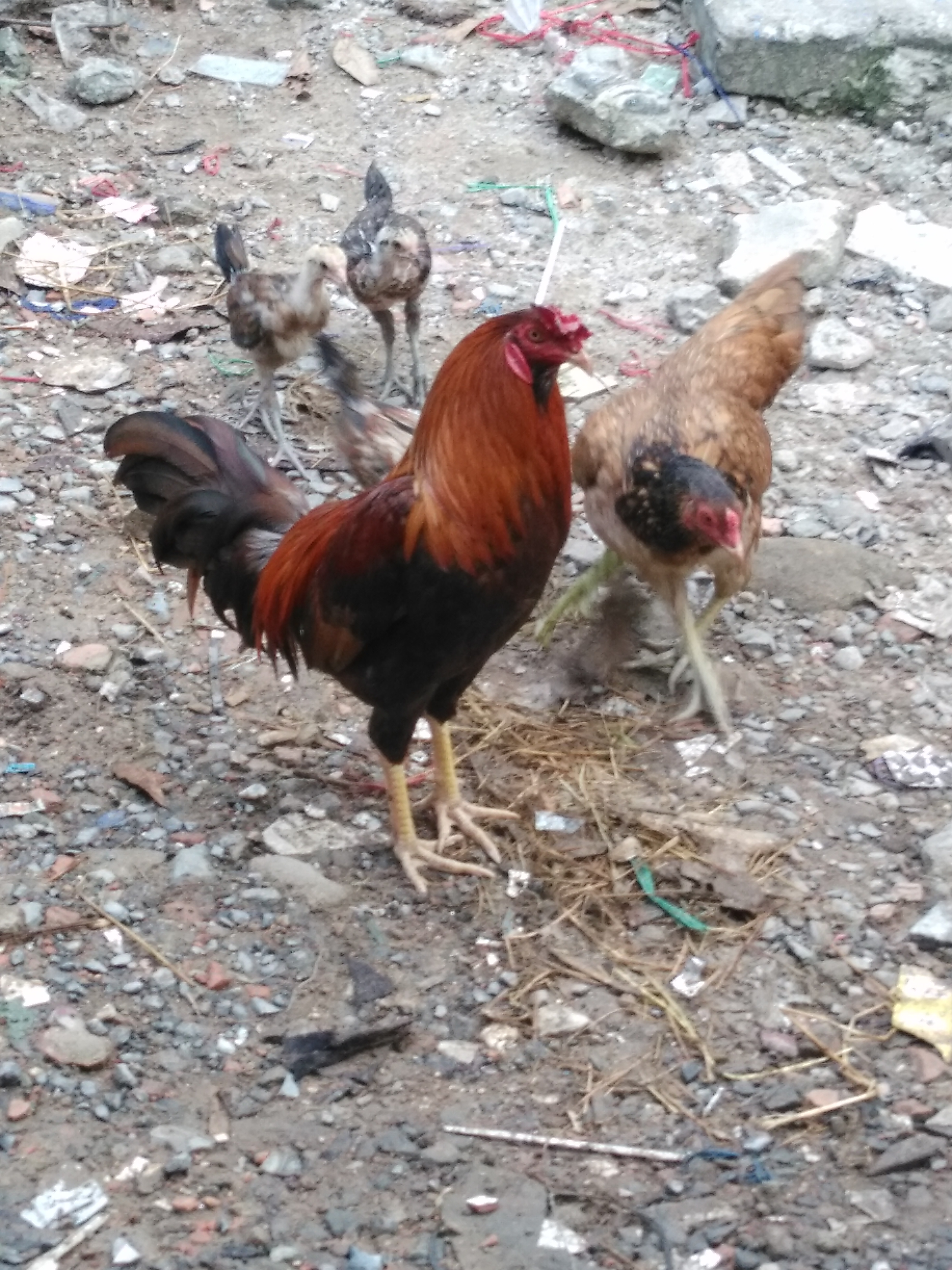 Hình tự chụp bằng máy di động cá nhân về một con gà chọi Cao Lãnh tại BHHA, Bình Tân